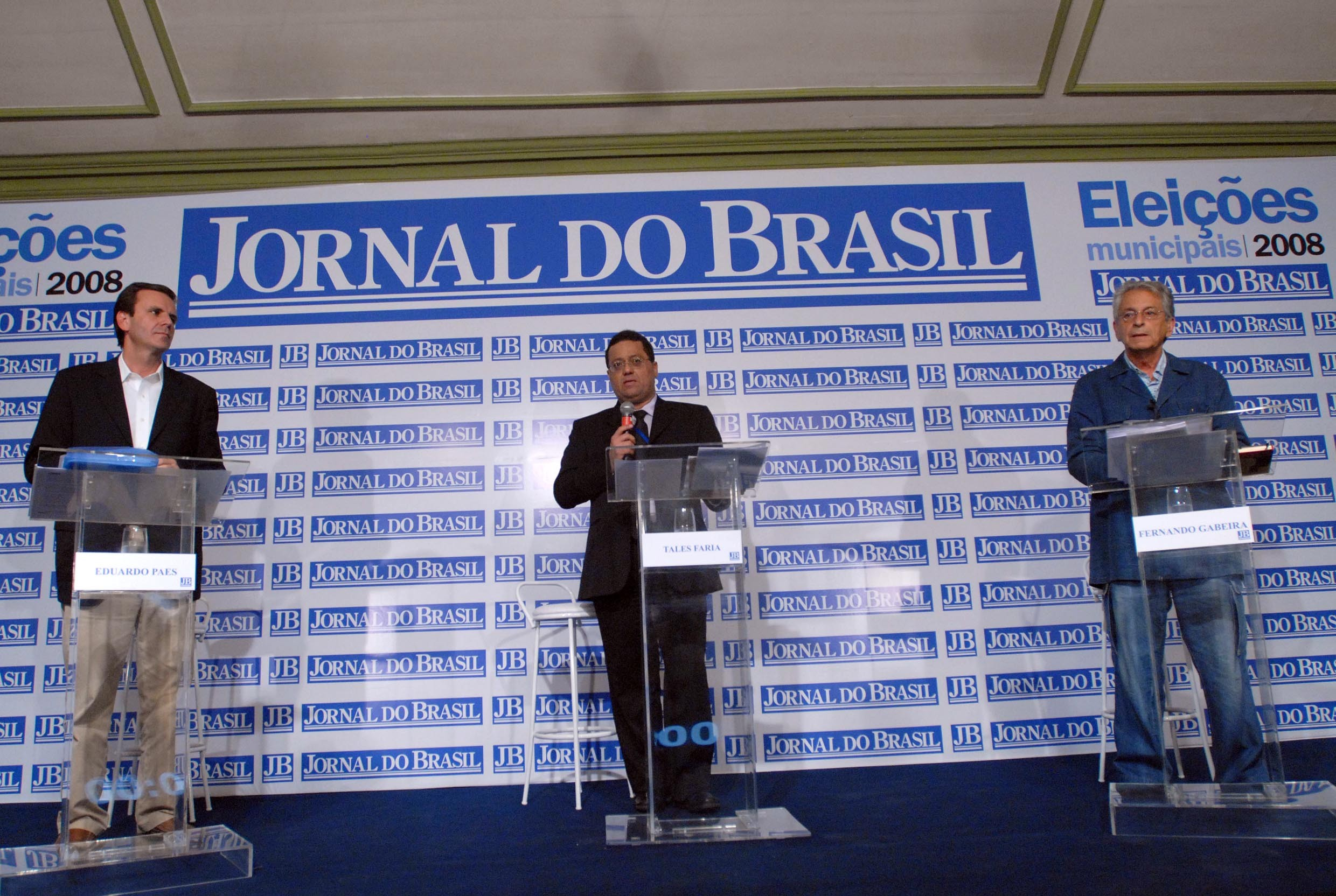 Um debate entre os candidatos à prefeitura da Cidade do Rio de Janeiro, Eduardo Paes e Fernando Gabeira